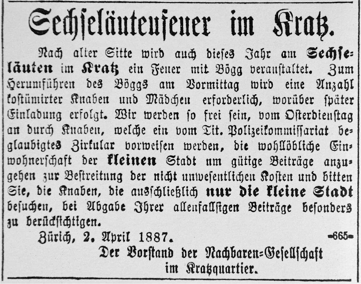 Sechseläuten Aufruf zum Sechseläuten im Kratzquartier